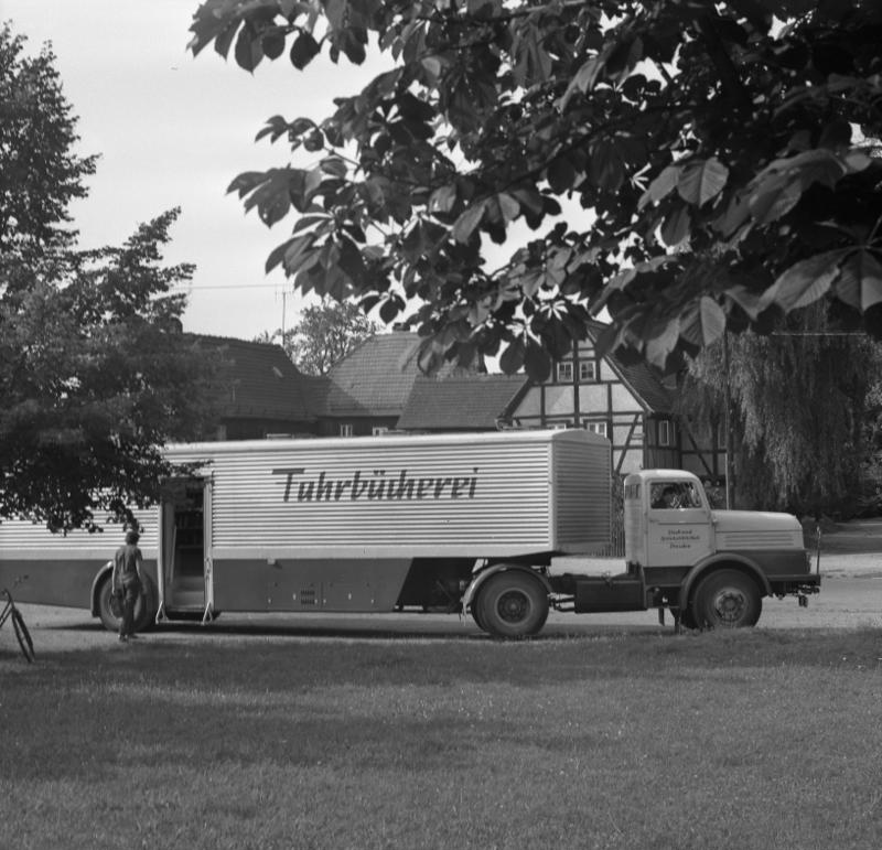 Dresden, Fahrbücherei Zentralbild/Häßler 4.9.70 Dresden: Bibliothek auf Rädern 7500 ständige Leser im Stadtgebiet von Dresden werden jährlich durch diese rollende Bücherei literarisch betreut.Seit einem Jahr sind zwei neue Fahrzeuge der Stadt- und Bezirksbibliothek Dresden im Einsatz. Jeweils 5000 Bücher kann ein Fahrzeug zu einem Standort mitnehmen. 30000 Bände stehen den Lesern der Bücherei insgesamt zur Verfügung.